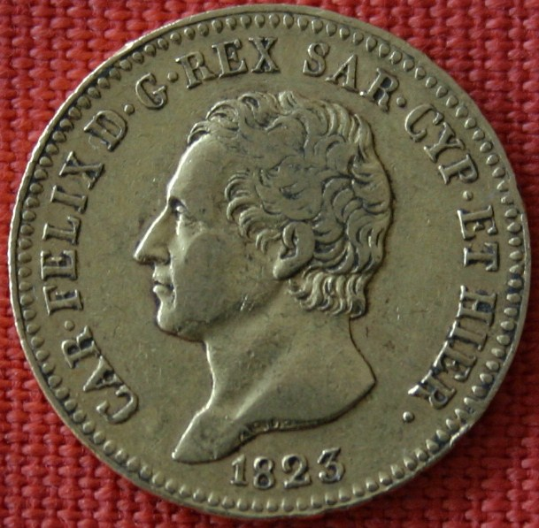 20 Lire Goldmünze geprägt nach den Normen der LMU von 1823 unter Karl Felix von Sardinien-Piemont